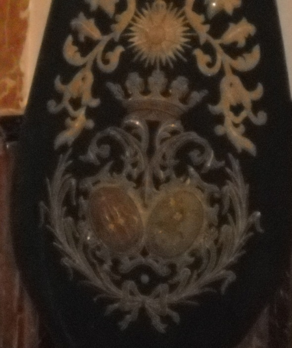 Escudo que aparece en el bacalao de la Hermandad